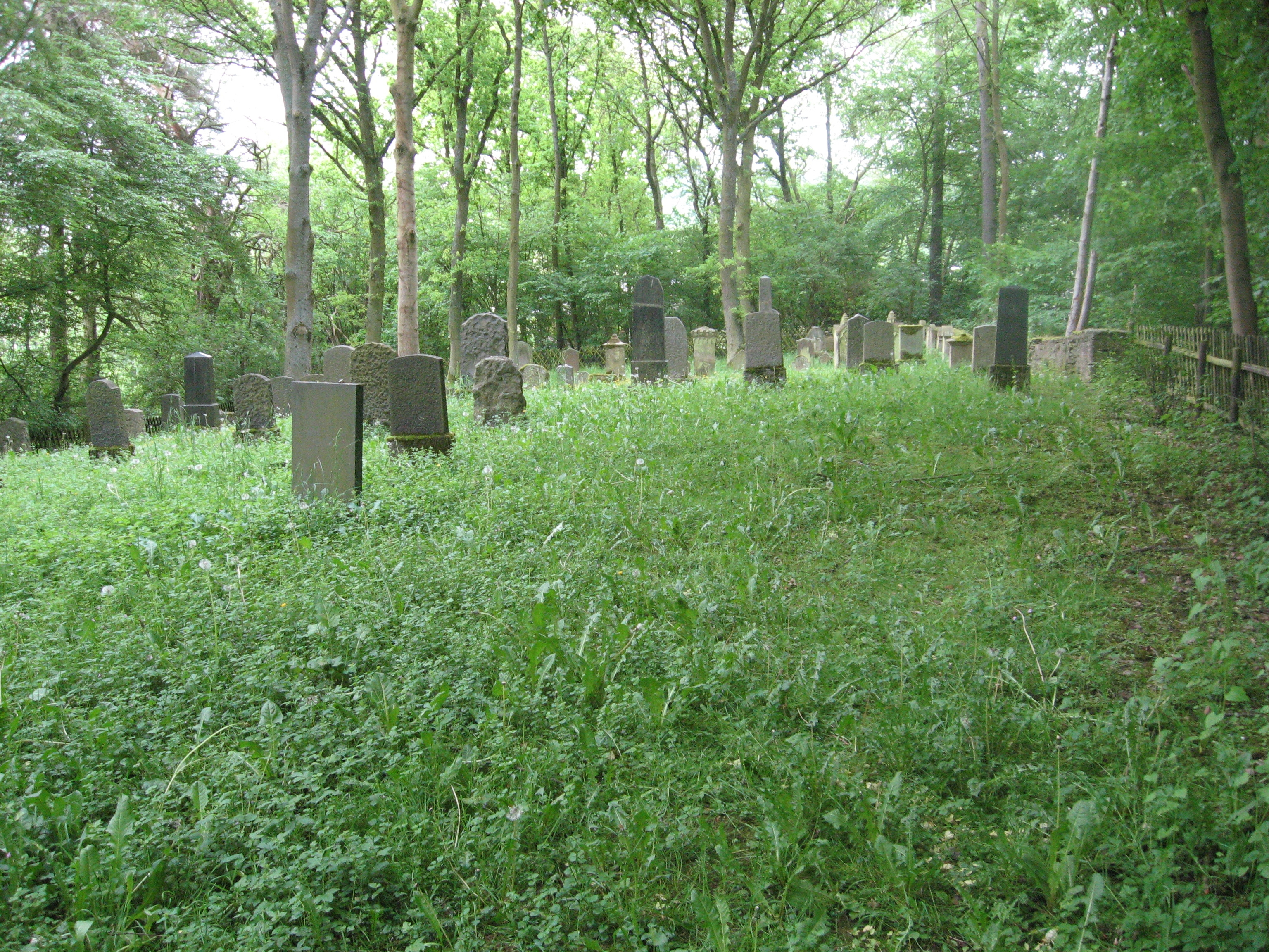 Jüdischer Friedhof in Simmern, Hunsrück, Germany